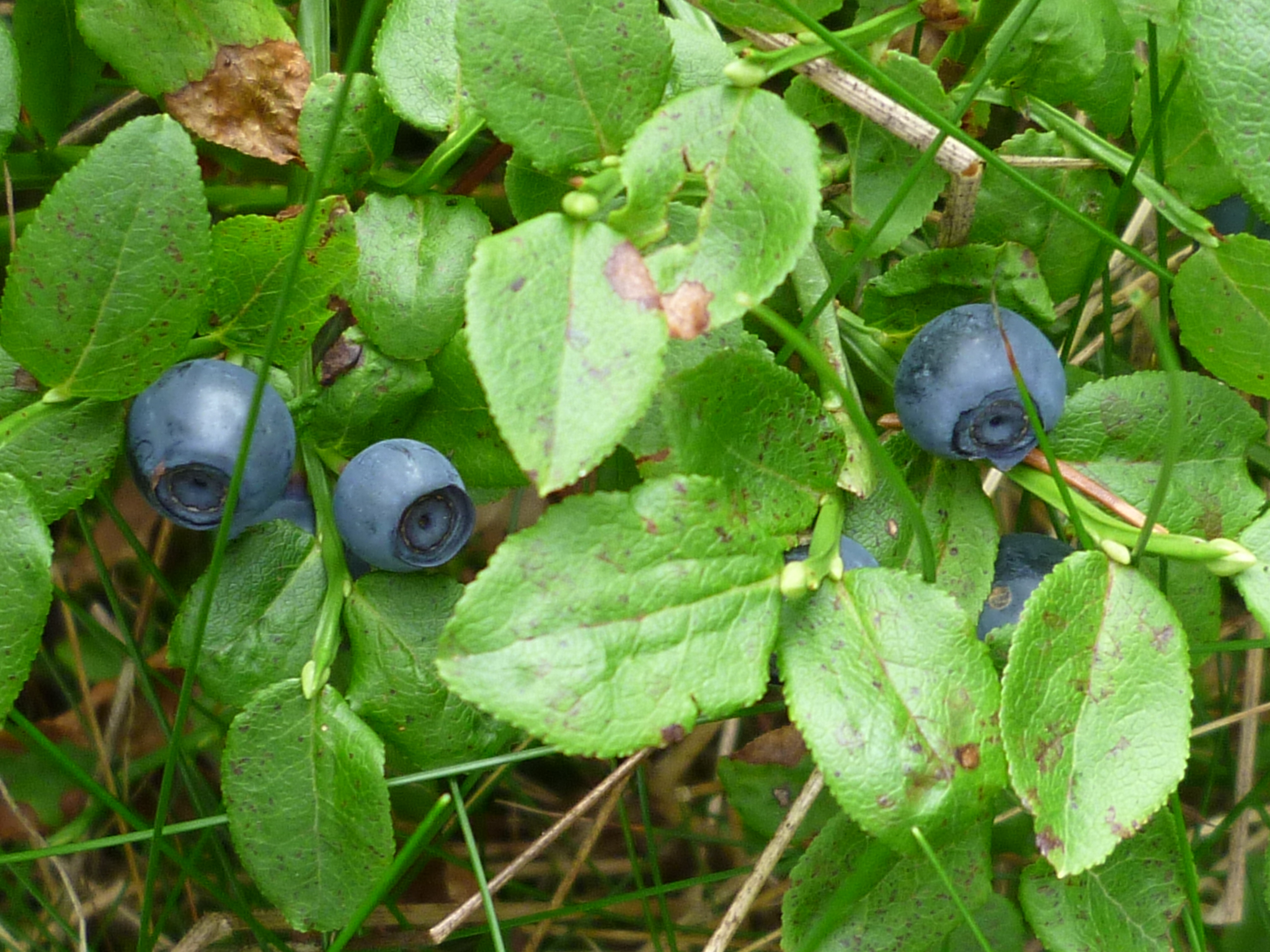 Reife Waldheidelbeeren (Vaccinum myrtillus) im Bereich des Pröller-Gipfels in Sankt Englmar im Juli 2015.